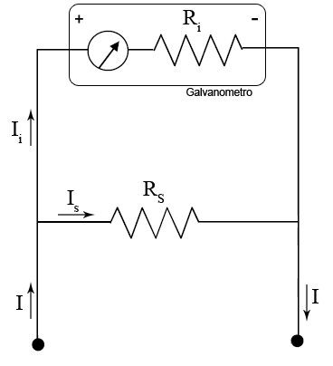 Circuito de un amperímetro